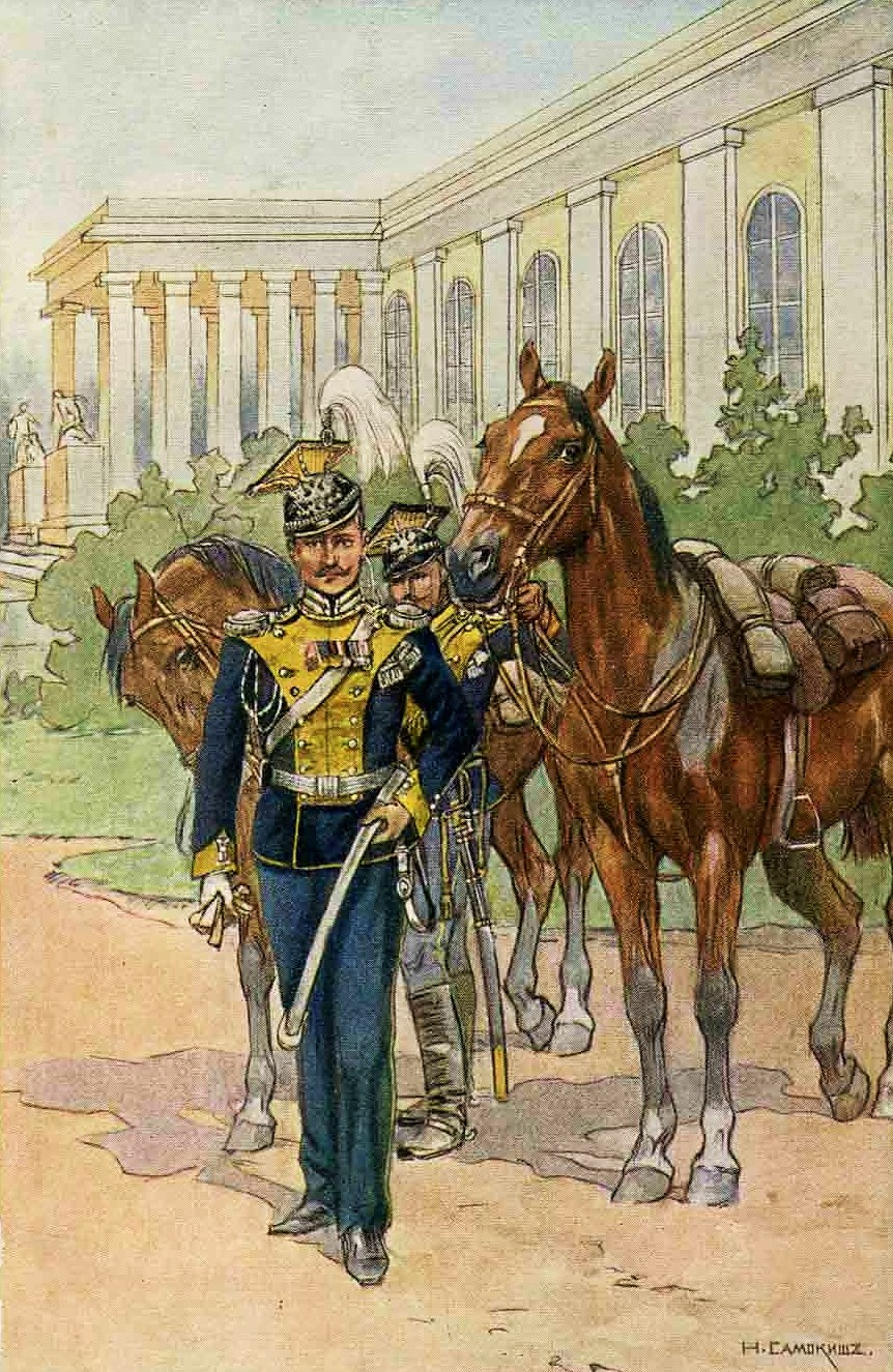 Николай Самокиш. Обер-офицер 13-го уланского Владимирского полка. Почтовая открытка. Издание Голике и Вильборг